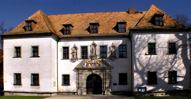 Das alte Schloss in Bad Muskau